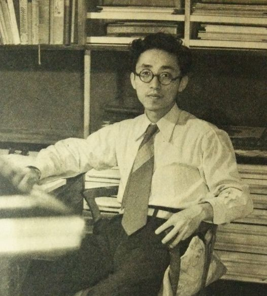 入野義朗